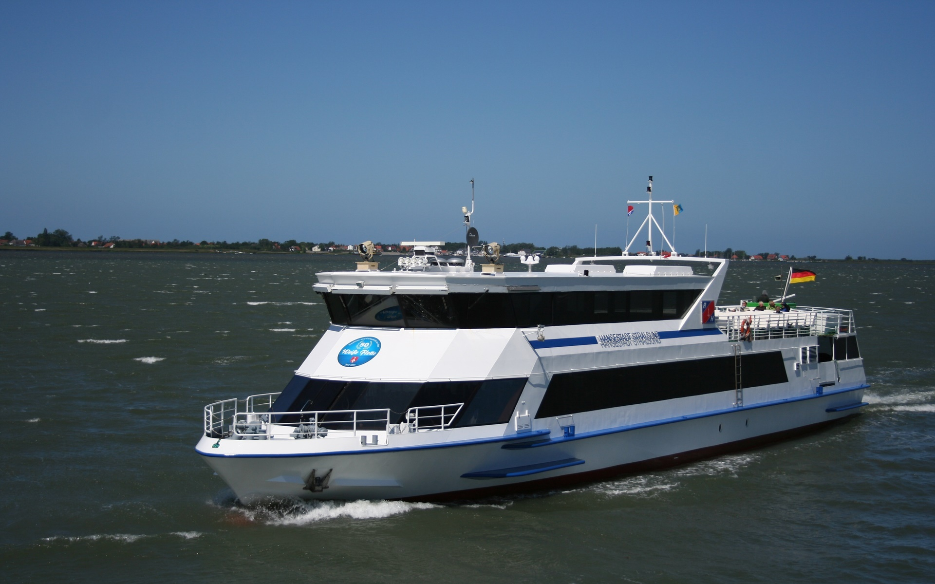 Bilder der Insel Hiddensee Name MS Hansestadt Stralsund Baujahr 1996 Werft Oderwerft Eisenhüttenstadt Länge 40,27m Breite 7,60m Tiefgang 1,25m Leistung 2 x 347kW Geschwindigkeit 14kn Personen 400 Einsatzgebiet Hiddenseeverkehr